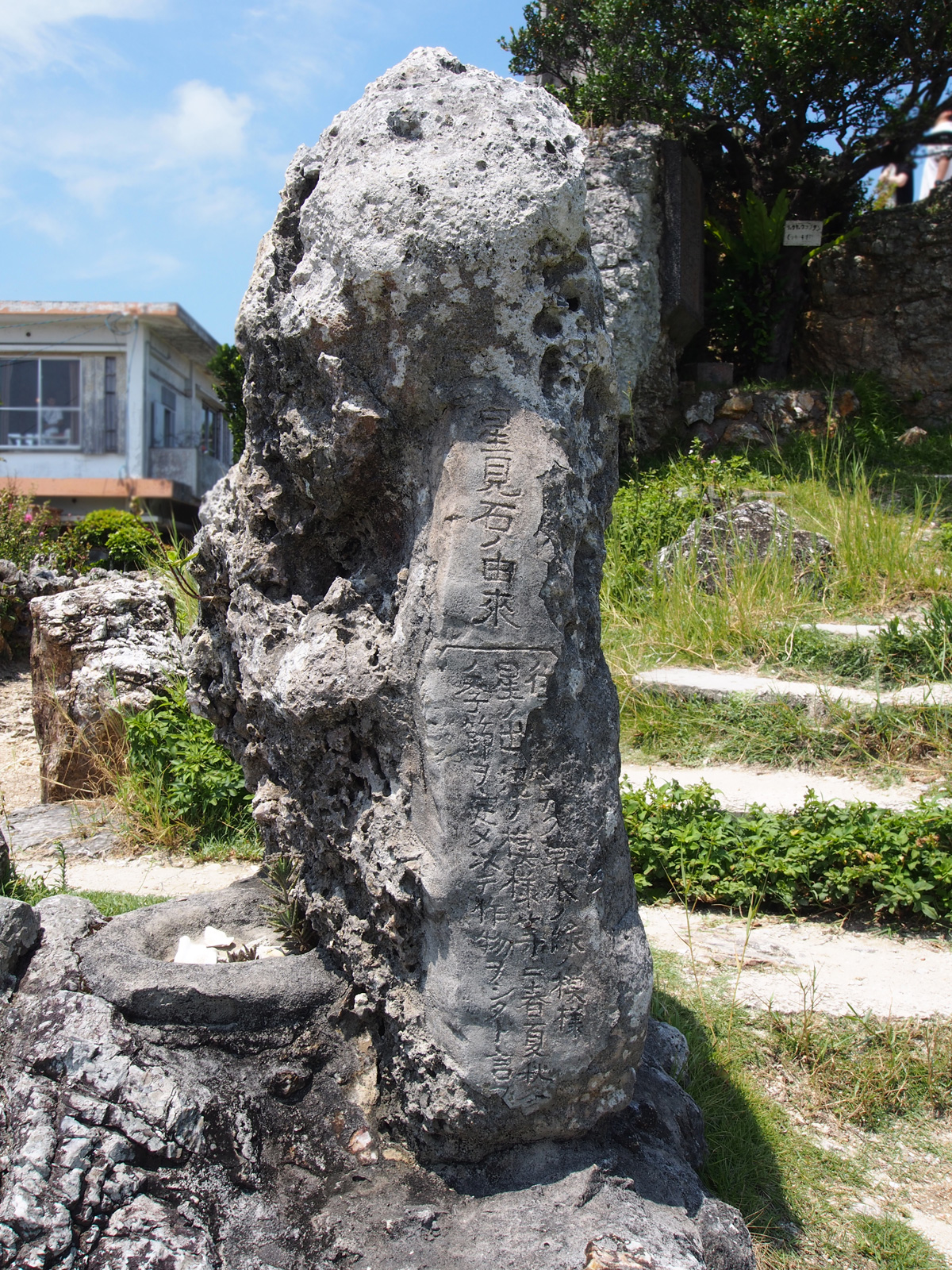 星見石（沖縄県竹富島）